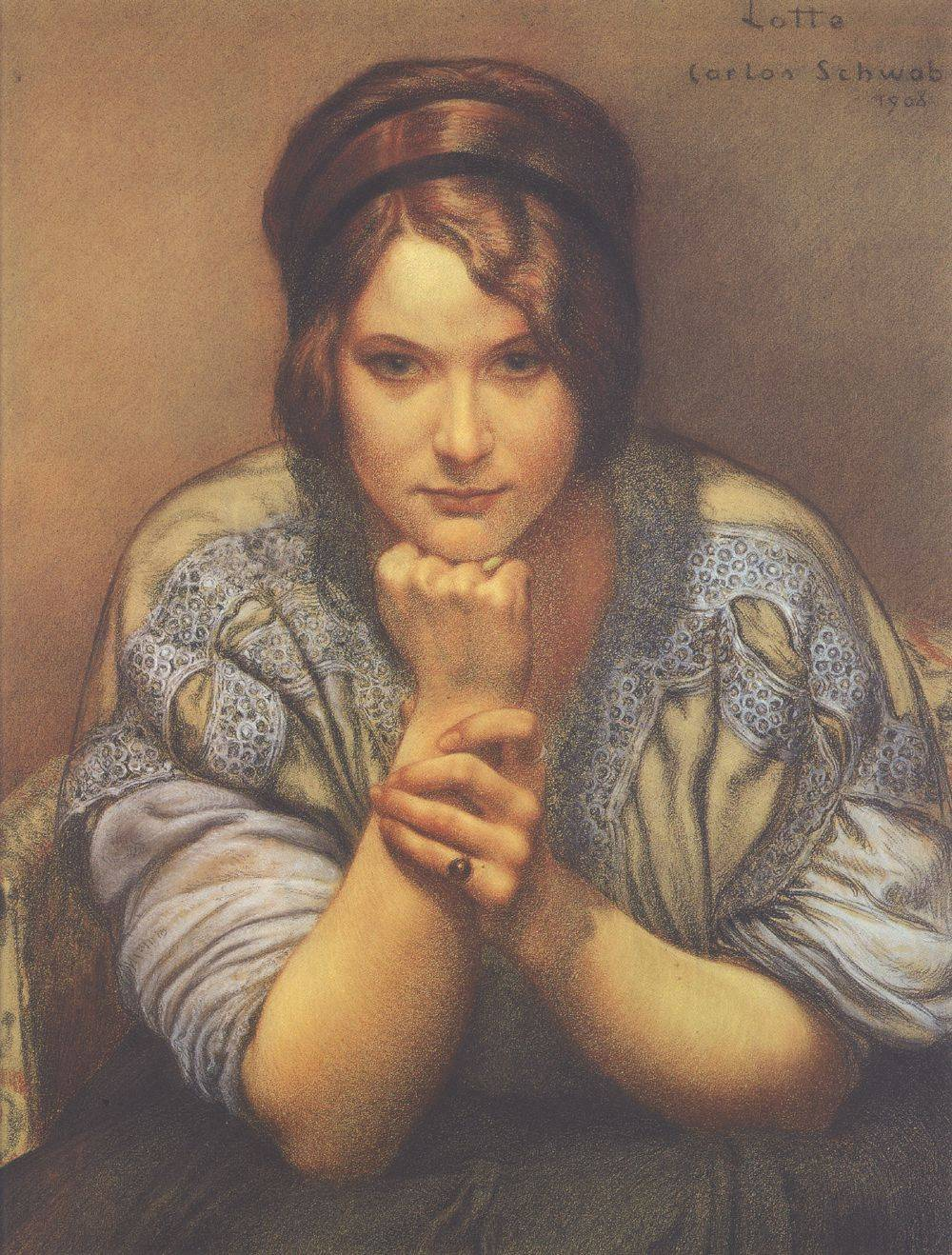 Porträt der Tochter